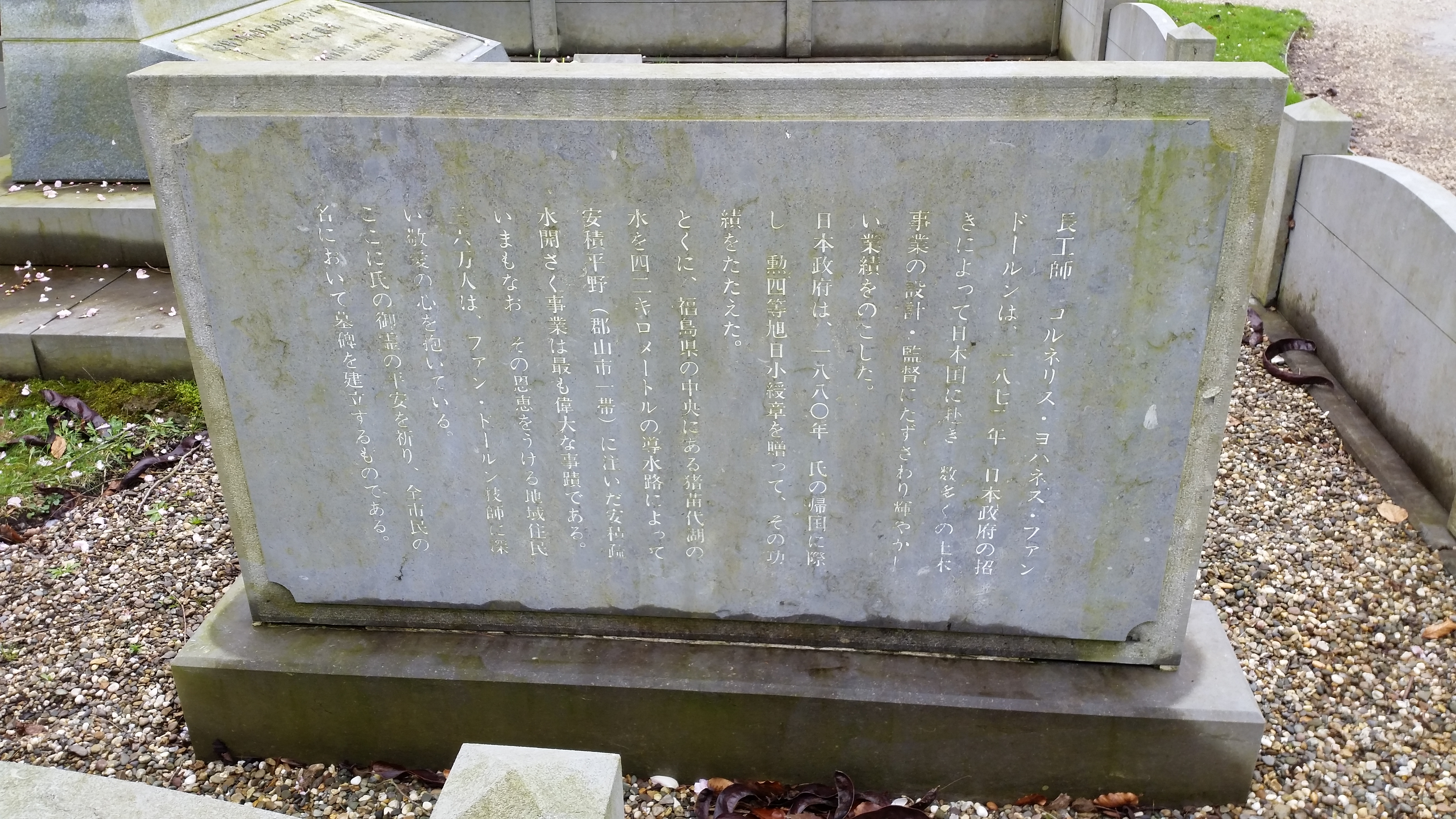 Monument van Cornelis Johannes van Doorn met 3 plaquettes, De Nieuwe Ooster, Amsterdam-Oost (februari 2020)